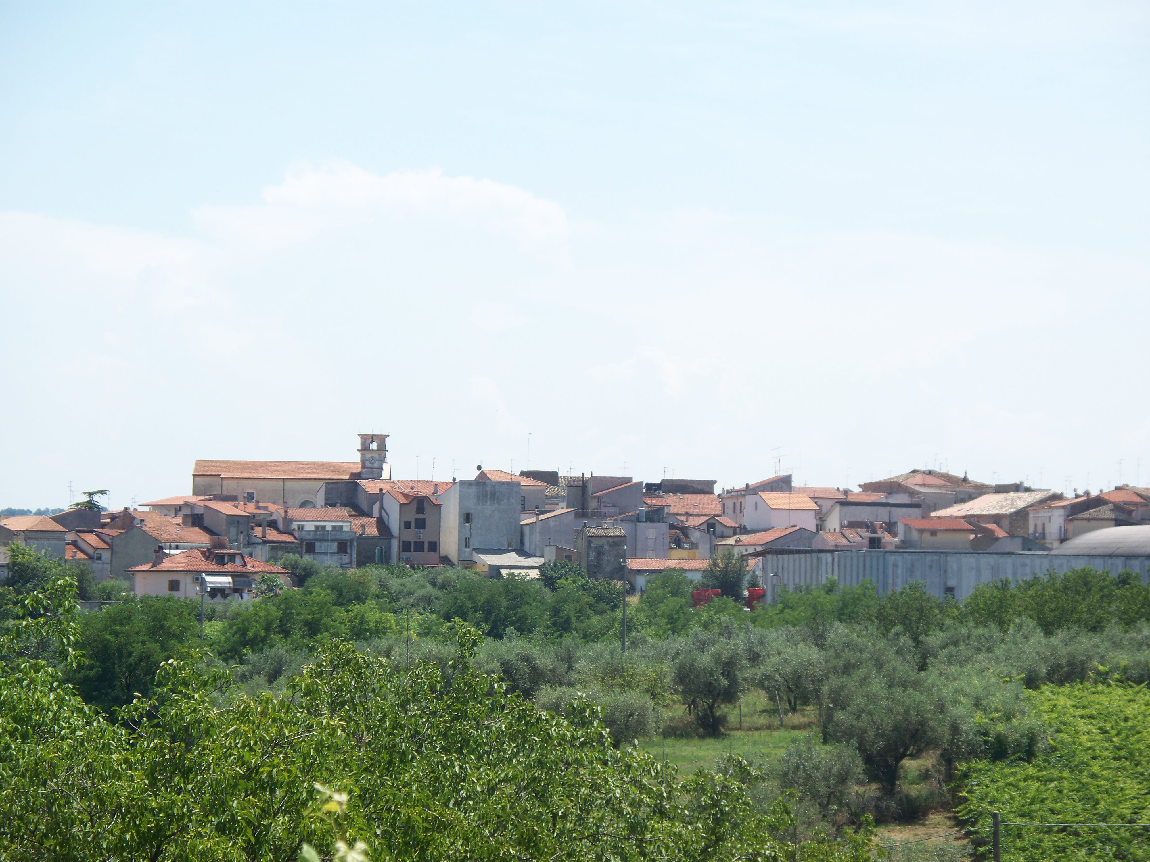 Caldari, frazione del comune di Ortona: panorama.